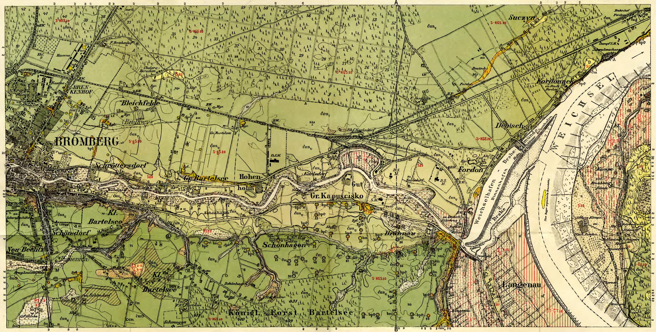 Niemiecka mapa agronomiczna 1:25000 Bydgoszcz część wschodnia